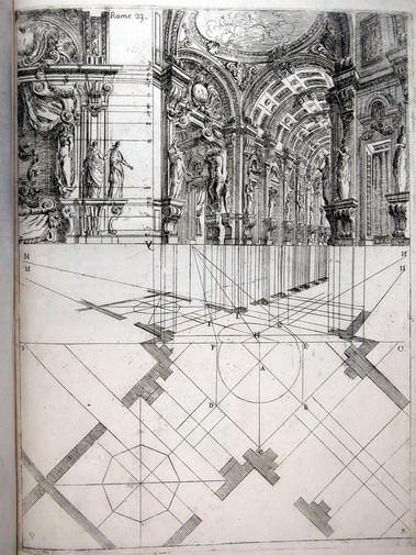 Ferdinando Galli de Bibiena, stage design showing a scena par angolo, 1711.jpg (Кутова побудова театральної декорації)